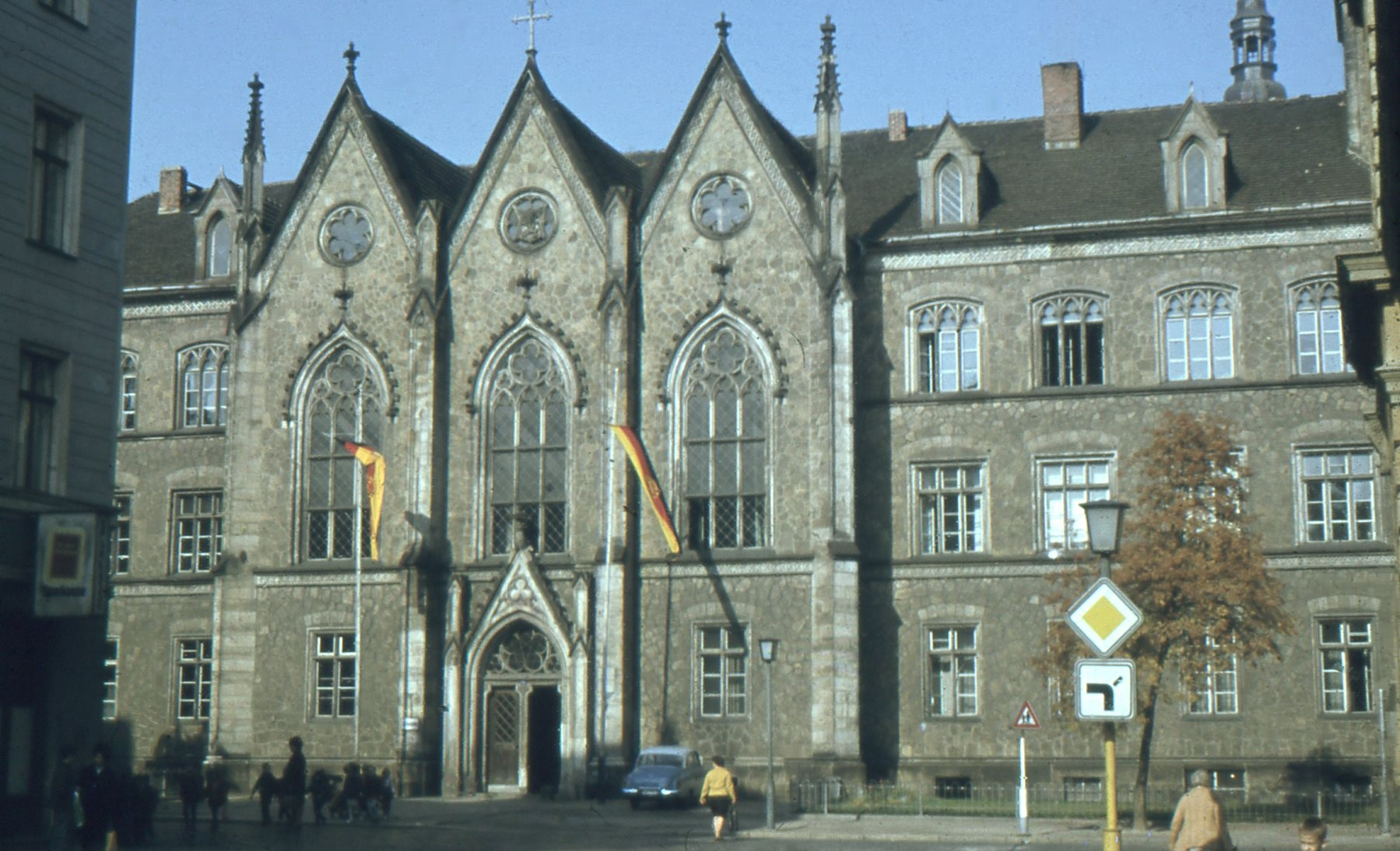 Polytechnische Oberschule Johannes Wüsten, heutiges Augustum in Görlitz